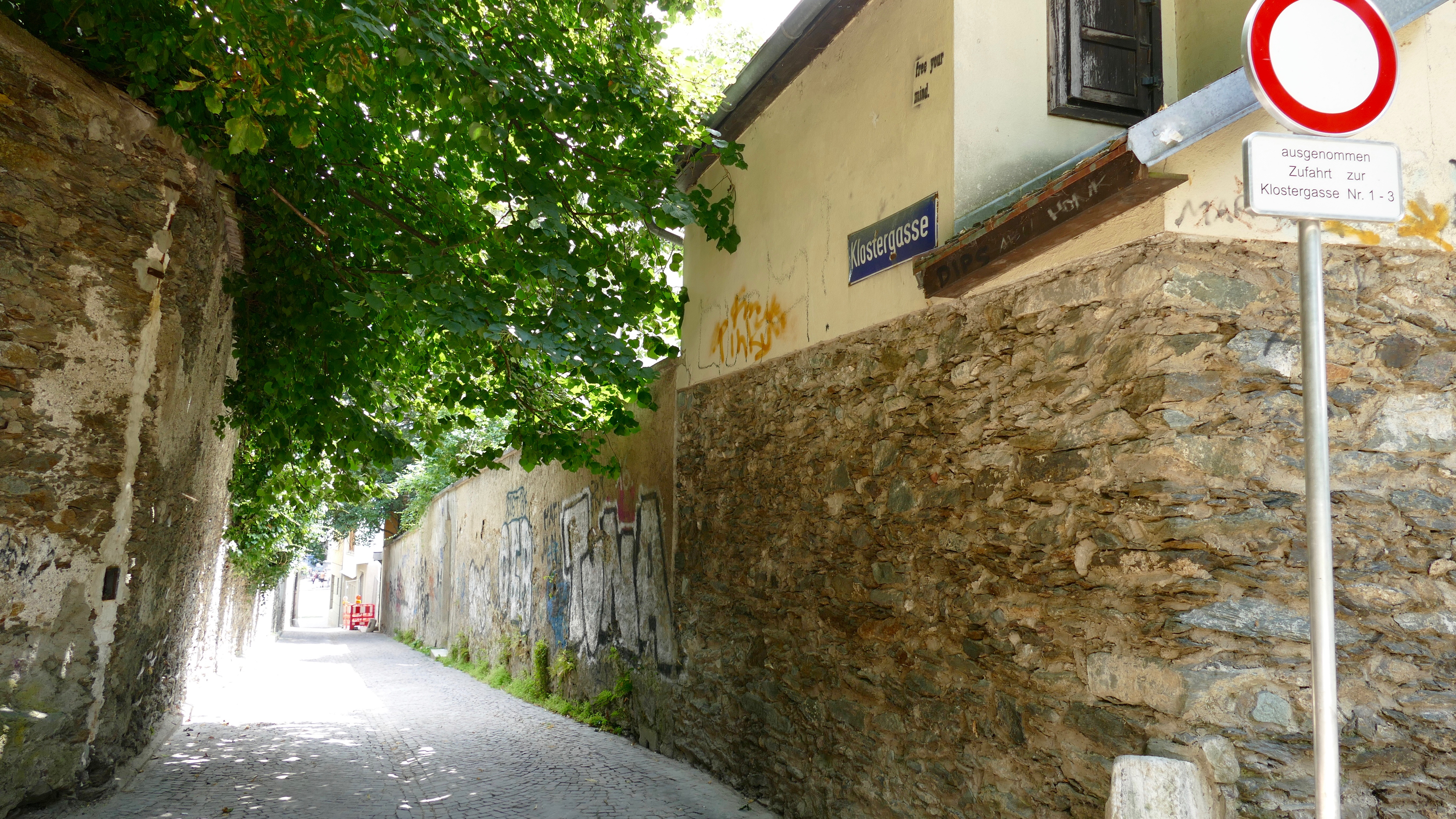 In der Klostergasse - Nähe Heiligengeistplatz - befand sich das Klagenfurter Atellier von Maria Lassnig. Das Atelier existiert noch, es wurde nach Renovierung in das Haus integriert.